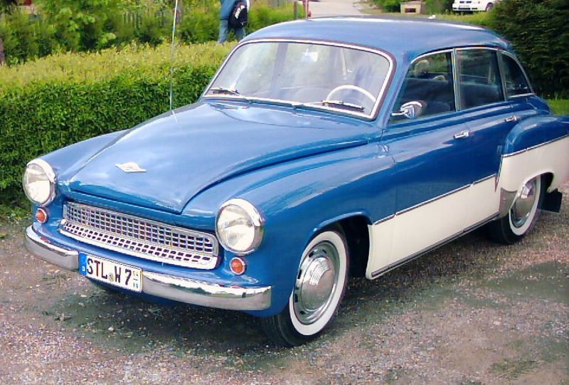 Wartburg 311/1 de luxe Baujahr Februar 1959